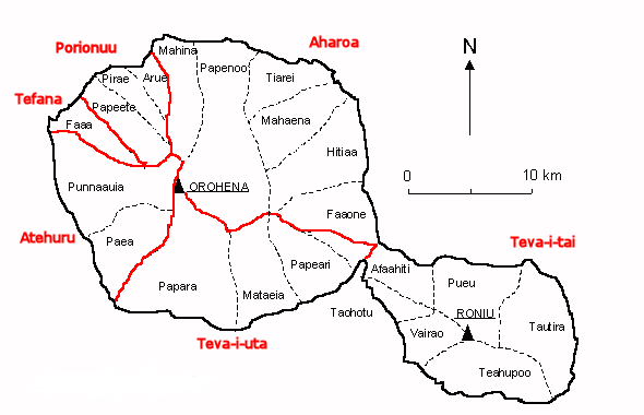 Federacions polítiques de Tahití al segle XVIII, en vermell. En negre són els districtes actuals.